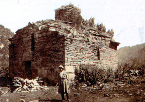 Южный Зеленчукский храм.